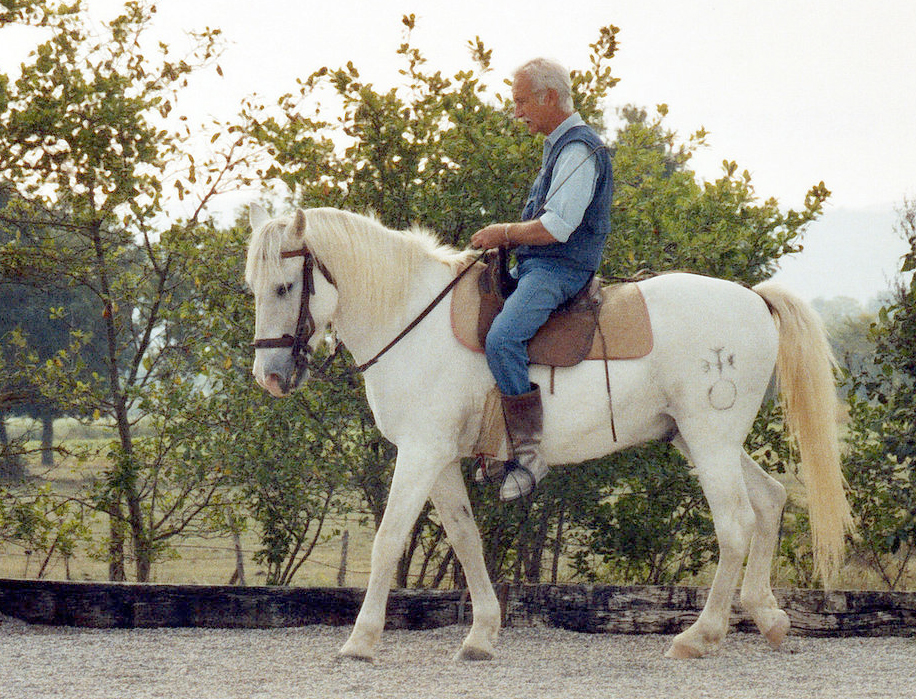 Sadko Solinski auf seinem Pferd "Ibis". Gezeigt wird die Übung "Schulterherein".